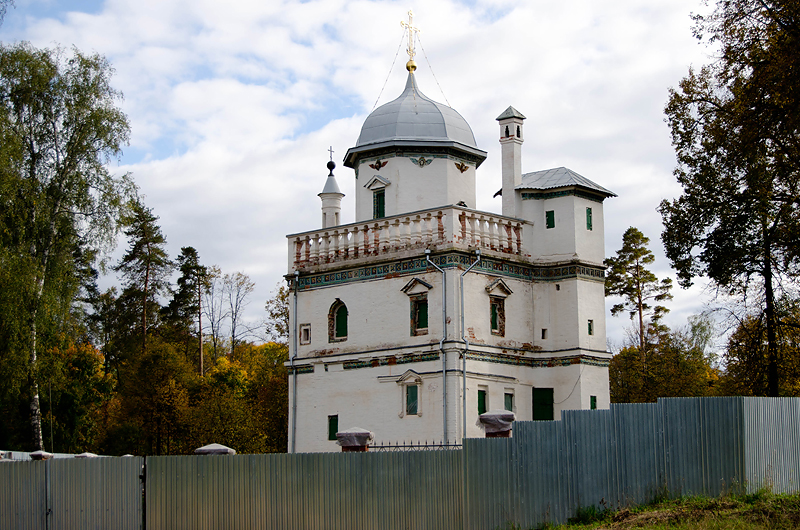 Скит Никона в сентябре 2012 года. На реконструкции. Вид со стороны реки Истра.